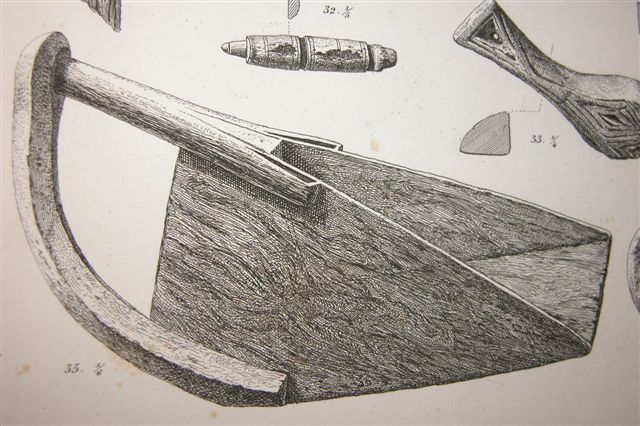 Øsekar af træ fra fyrretræsbåden.